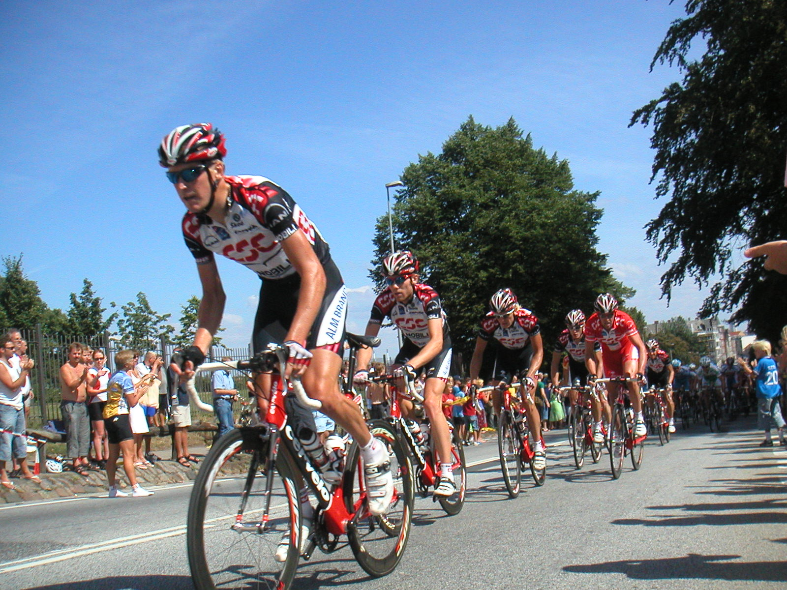 Ryttere fra Team CSC på Valby Bakke under Post Danmark Rundt, 6. august 2006.